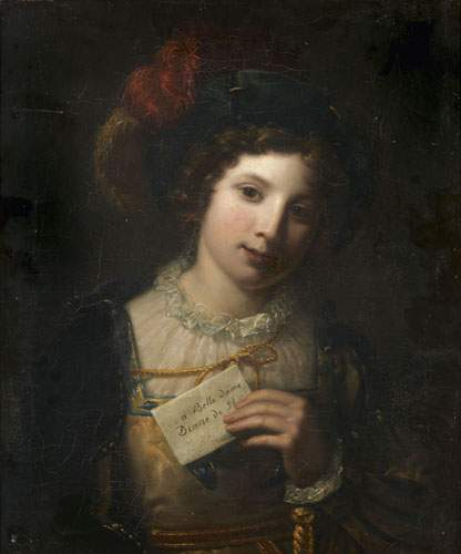 Diana di Poitiers, olio su tela, 65 x 54 cm, collezione privata